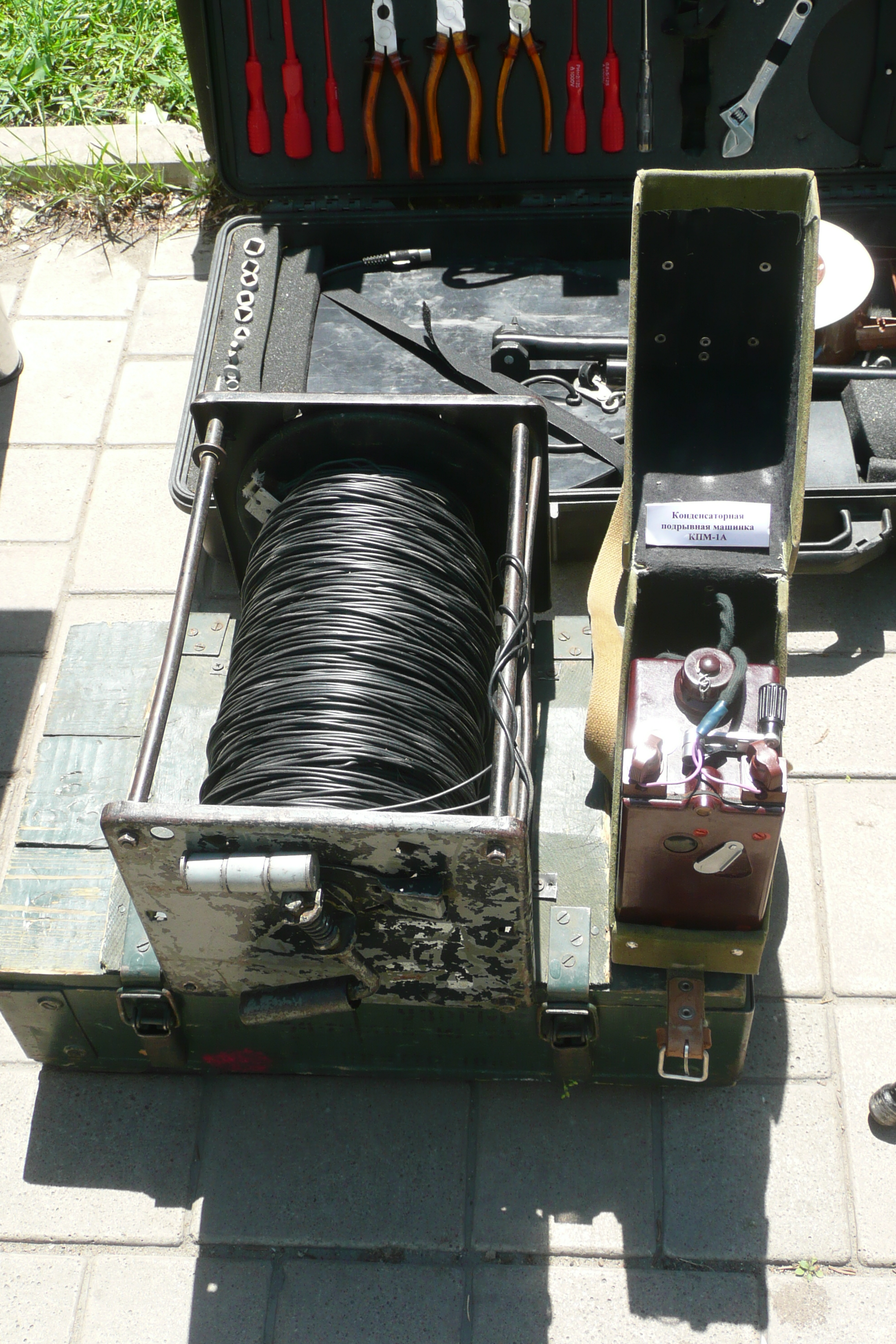 Провод, конденсаторная подрывная машинка КПМ-1А и набор инструментов сапёра, продемонстрированные в День защиты детей в Донецке